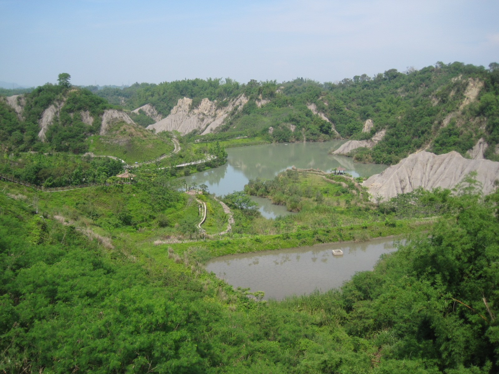 位於臺南龍崎的牛埔泥岩水土保持教學園區